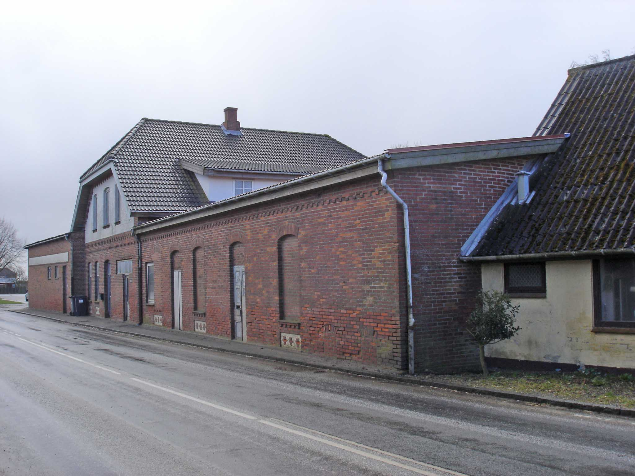 Neder Tandslet Station, vejsiden fra nord